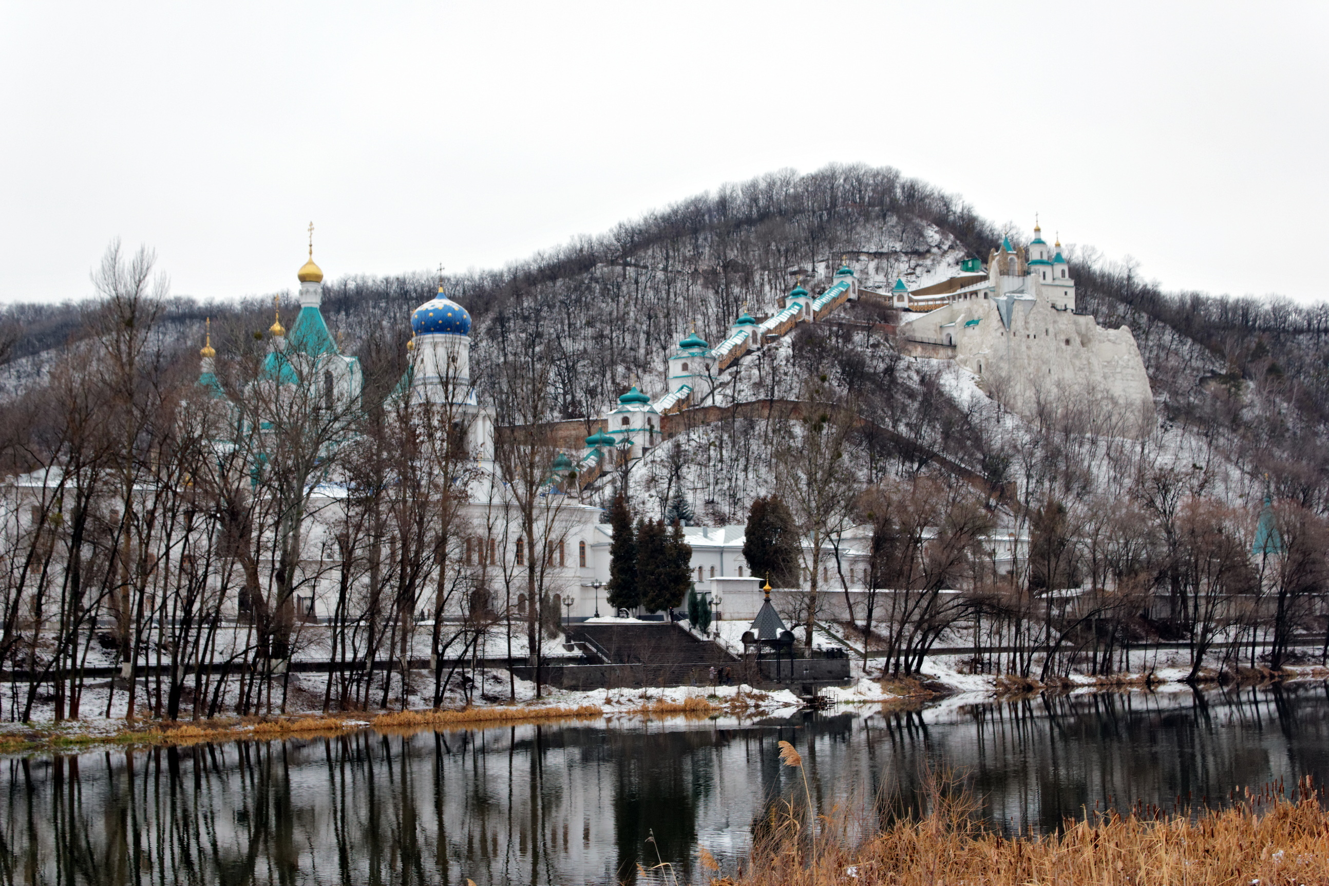 Святогорск. Северский Донец. Свято-Успенская Святогорская Лавра